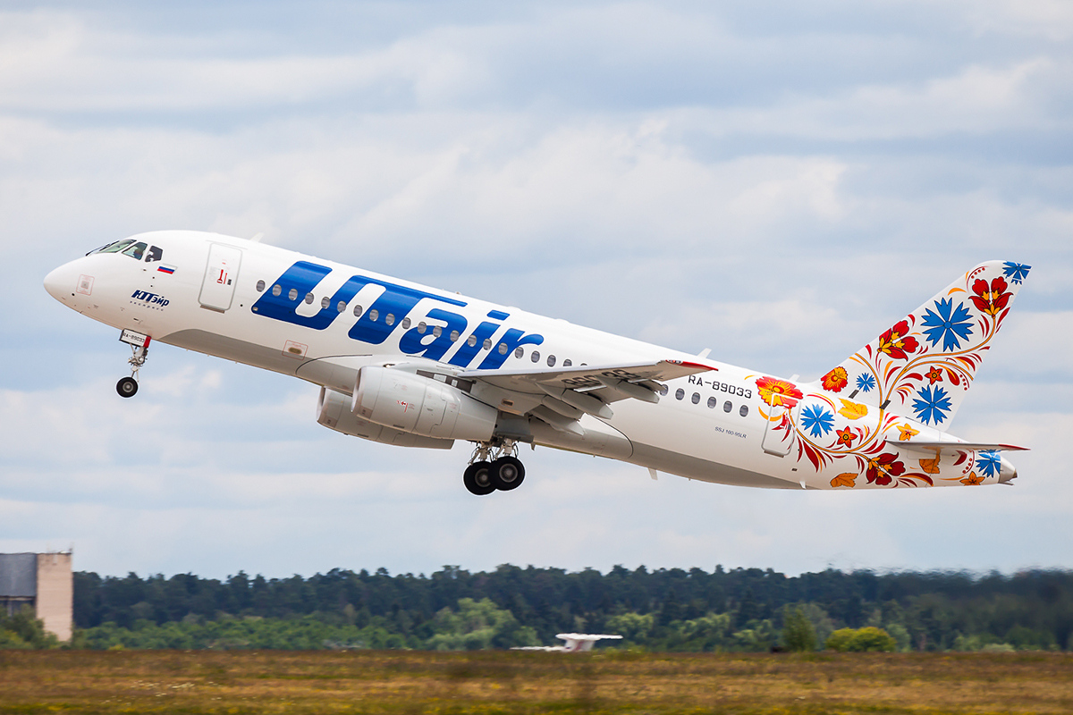 UTair Express Sukhoi Superjet 100-95LR (RA-89033 cn 95060) performing a test flight from Ramenskoye - UUBW